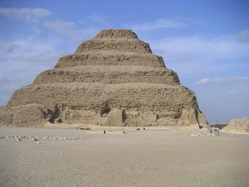 Vue de la face sud de la pyramide de Djéser - Saqqarah - IIIe dynastie égyptienne